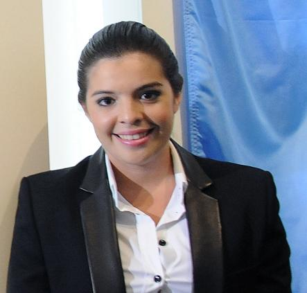 Dalma Maradona en la inauguración de la Galería de los Ídolos Populares en Casa Rosada.